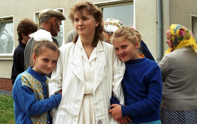 Juni 1988 Friedland Grenzdurchgangslager für Aussiedler und Flüchtlinge Eine Familie aus Kasachstan